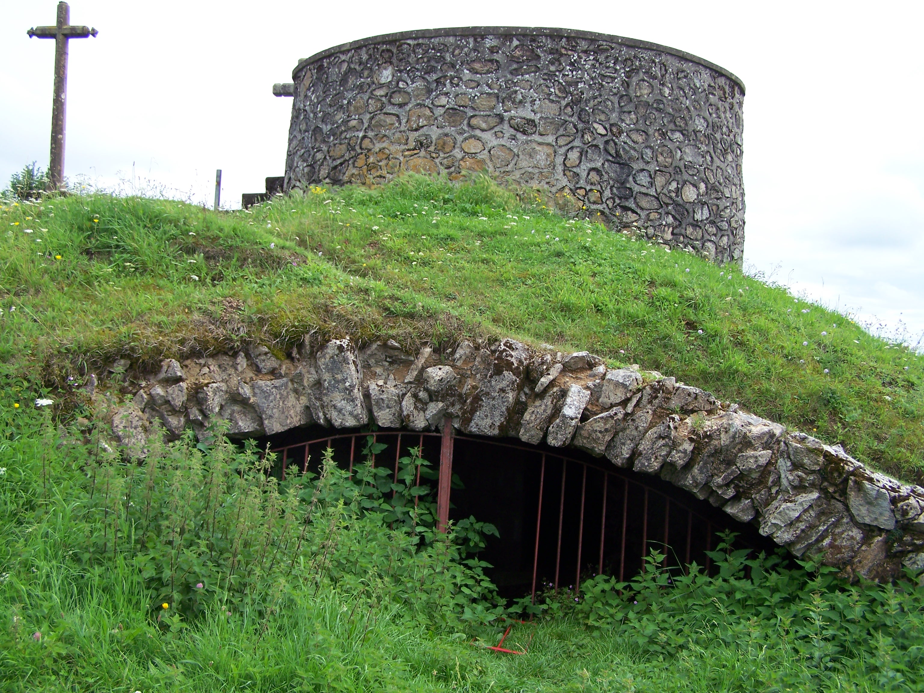 Vestiges d'un ancien souterrain de l'ancien château de Château-Chinon (Ville) (Nièvre, France). La petite tour située au-dessus supporte la table d'orientation située au faîte du Calvaire qui surplombe la ville.